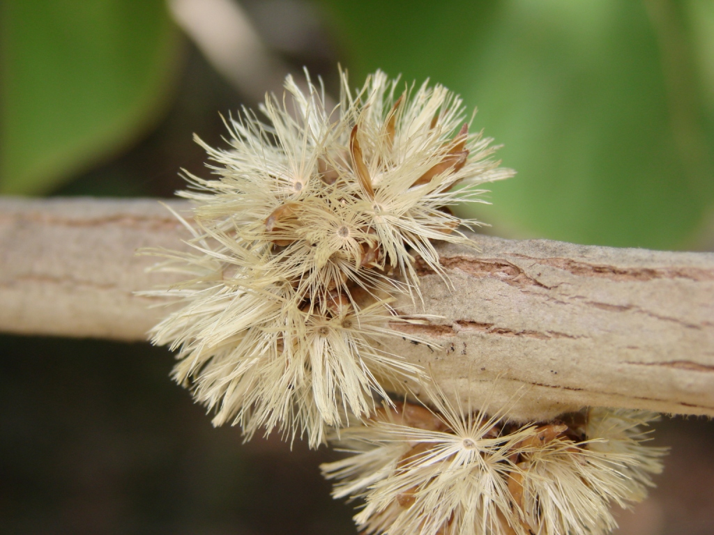 Piptocarpha rotundifolia - ASTERACEAE Jardim Botânico de Brasília - Distrito Federal - Brasil.